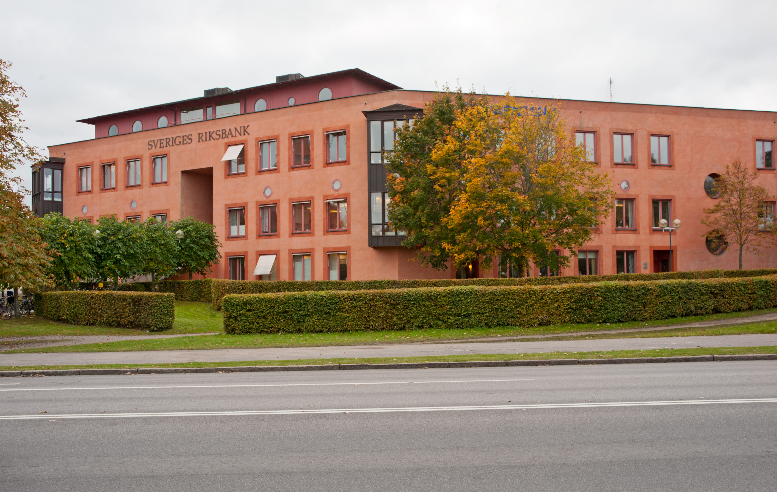 Gamla Riksbankshuset i Linköping, numera använd som skola.